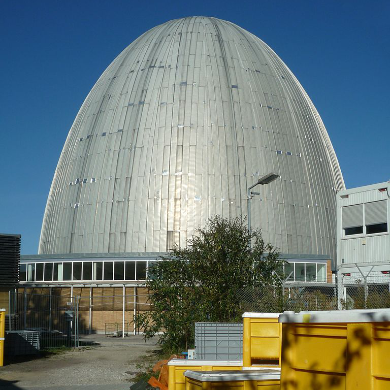 Forschungsreaktor München, Garching bei München